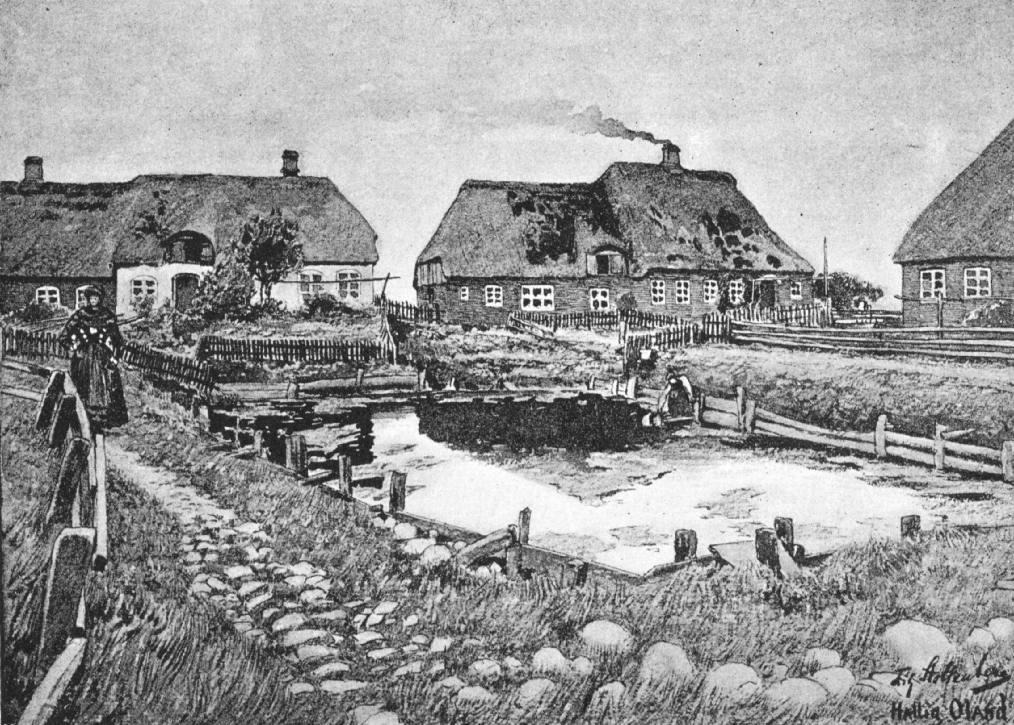 Fething der Hallig Oland, Zeichnung von Fritz Stoltenberg